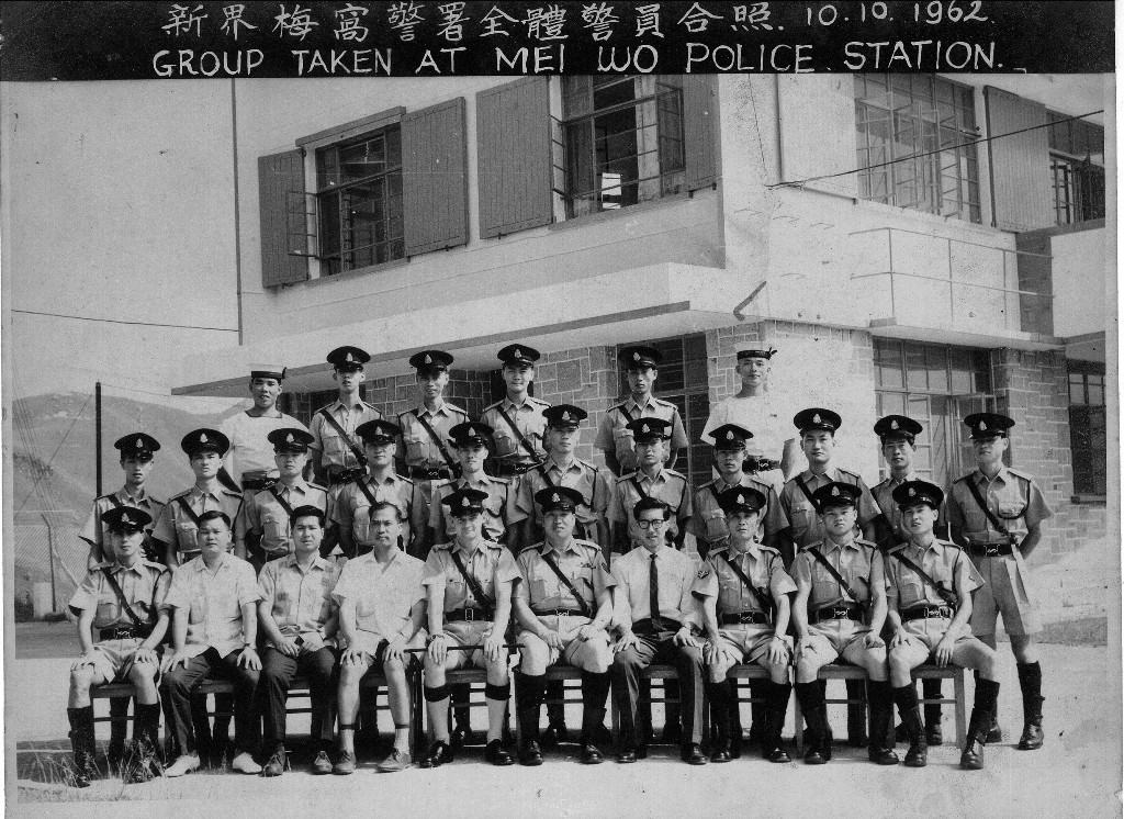 62年梅窩華探便衣